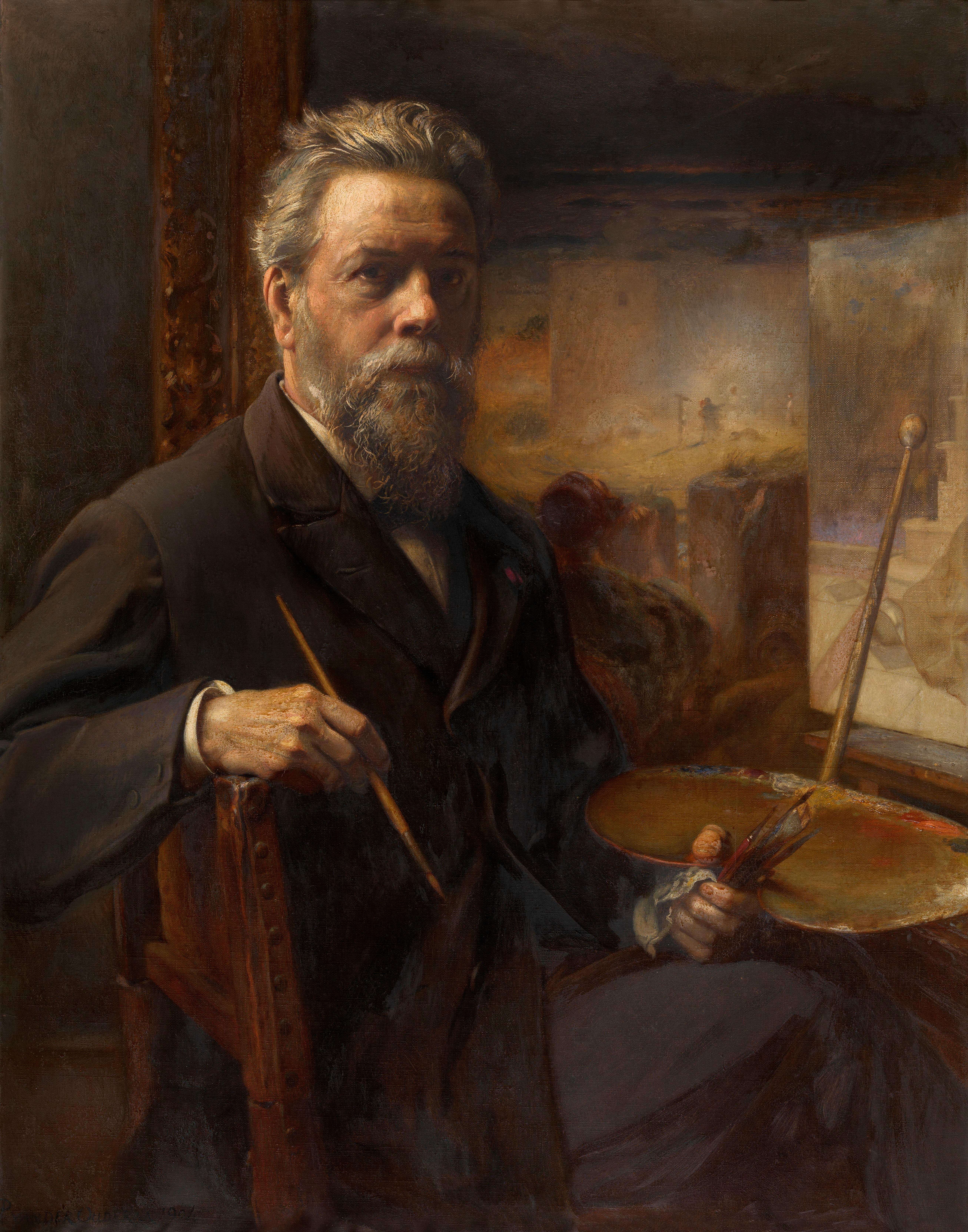 Pierre Jean Van der Ouderaa, zelfportret